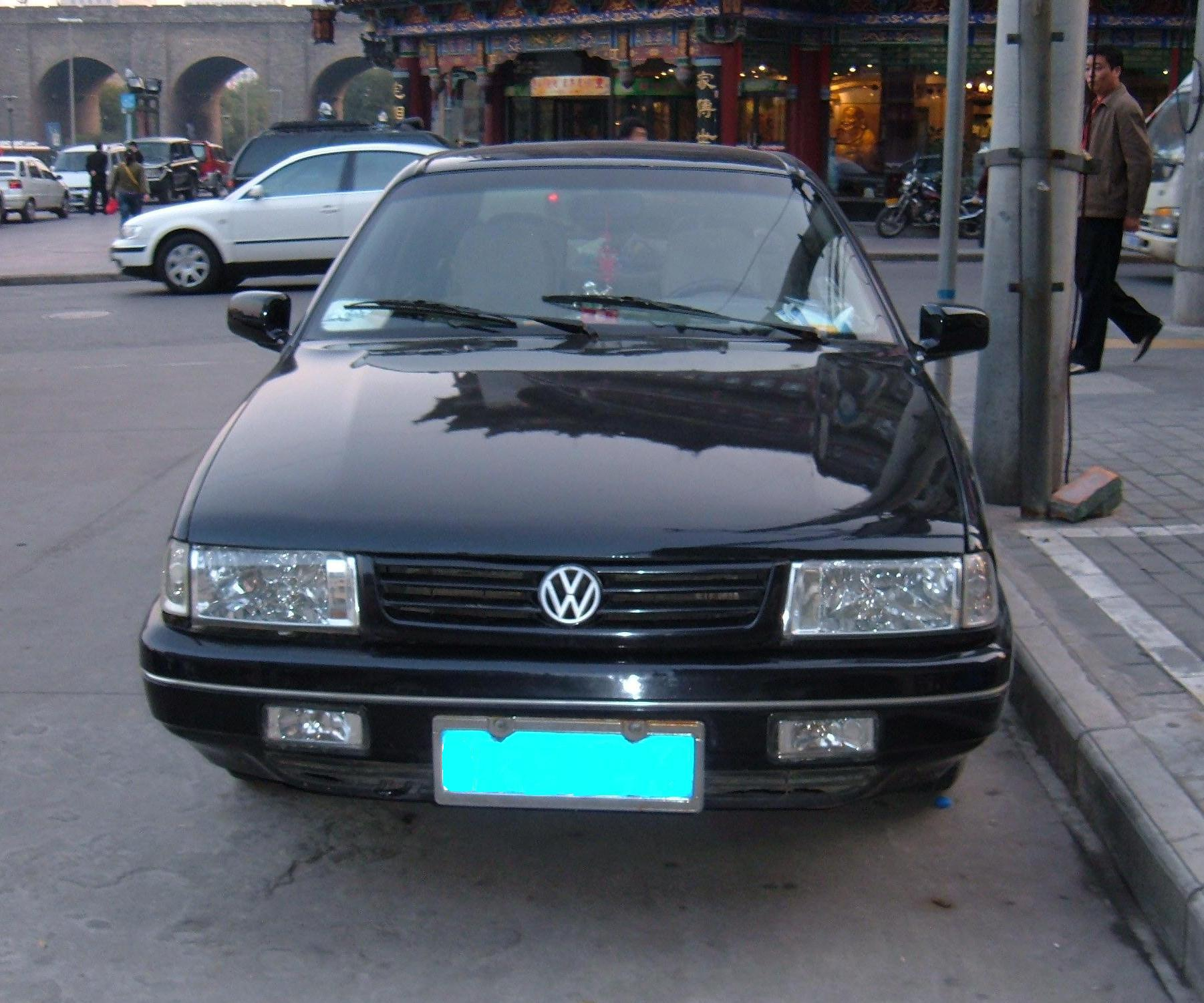 Black Volkswagen Santana 2000 in Xi'an, PRC.